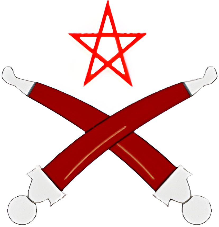 Escudo de la Región de Afar